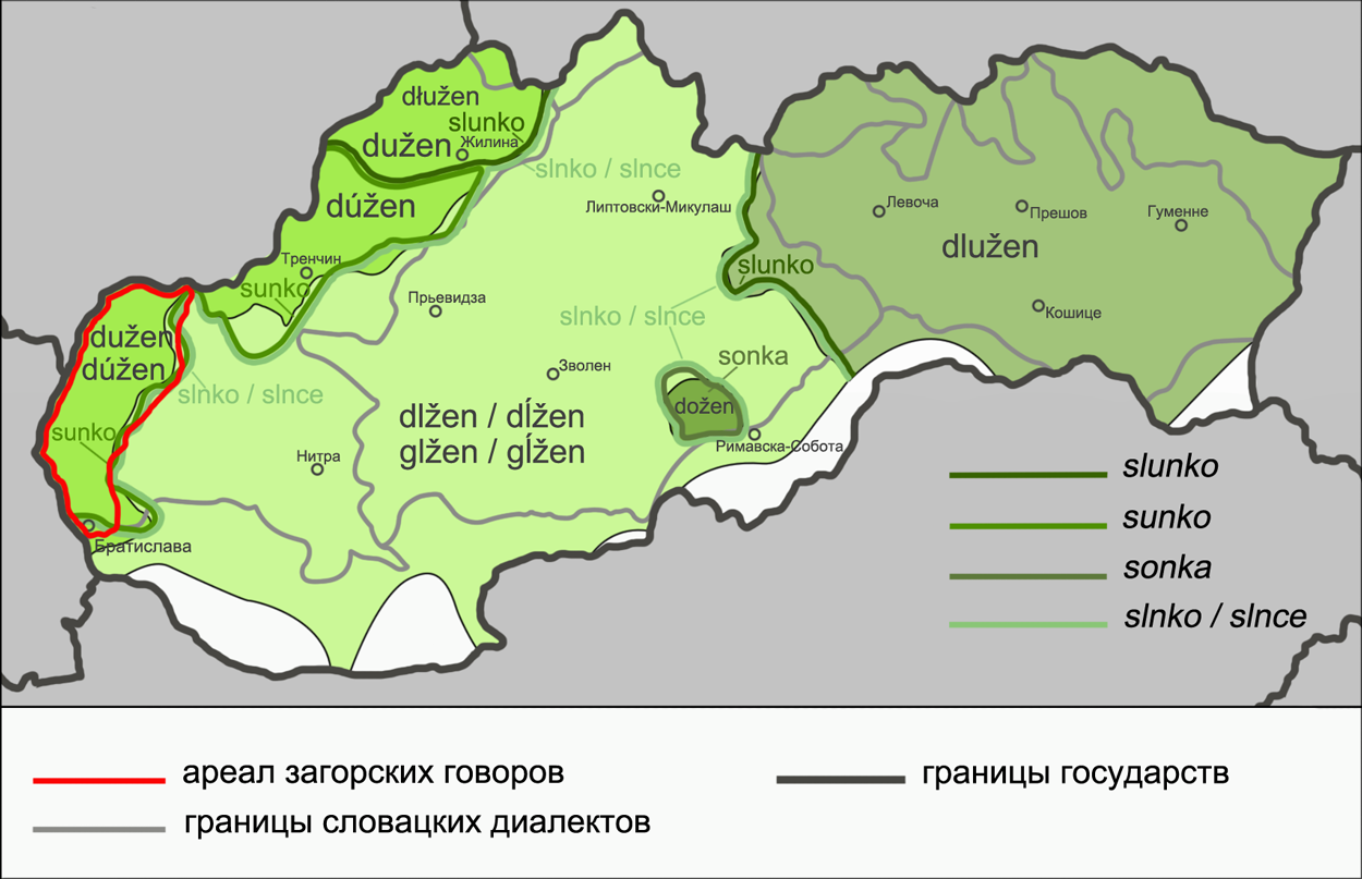 Континуанты сочетания язычного согласного и плавного l̥ в словацких диалектах (c указанием загорского ареала) на примере слов dlžen и slnko. Источники: Pauliny E. Fonologický vývin slovenčiny. — Bratislava: Slovenské pedagogické nakladateľstvo, 1963. — 360 S. — s. 158—159